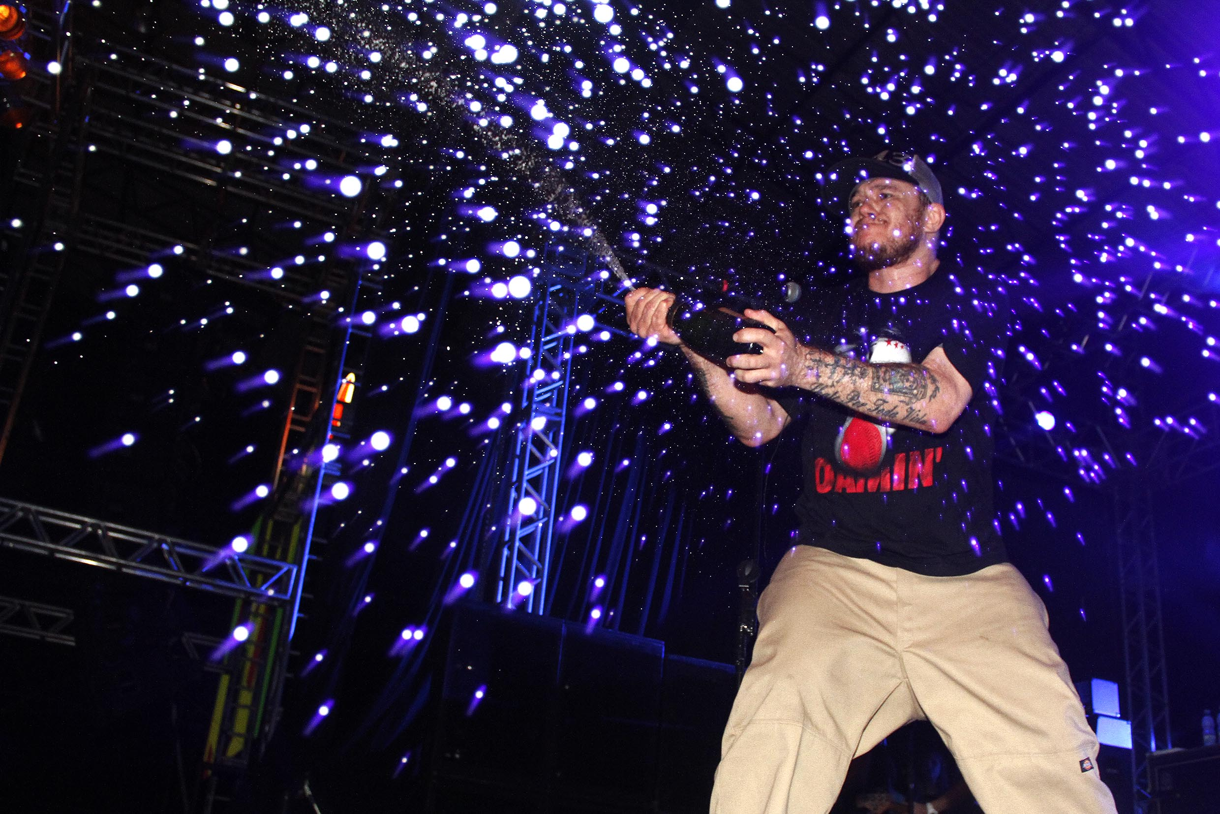 A banda Charlie Brown Junior lotou o Pepsi on Stage no último sábado, 20 de Outubro, para o seu show de lançamento do CD e DVD “Música Popular Brasileira”.